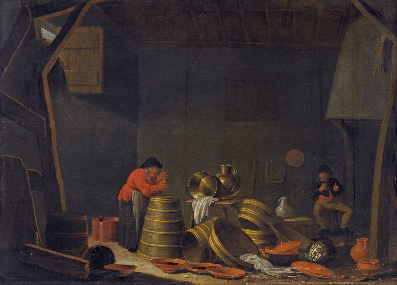 Interieur eines Bauernhauses mit butternder Bäuerin.